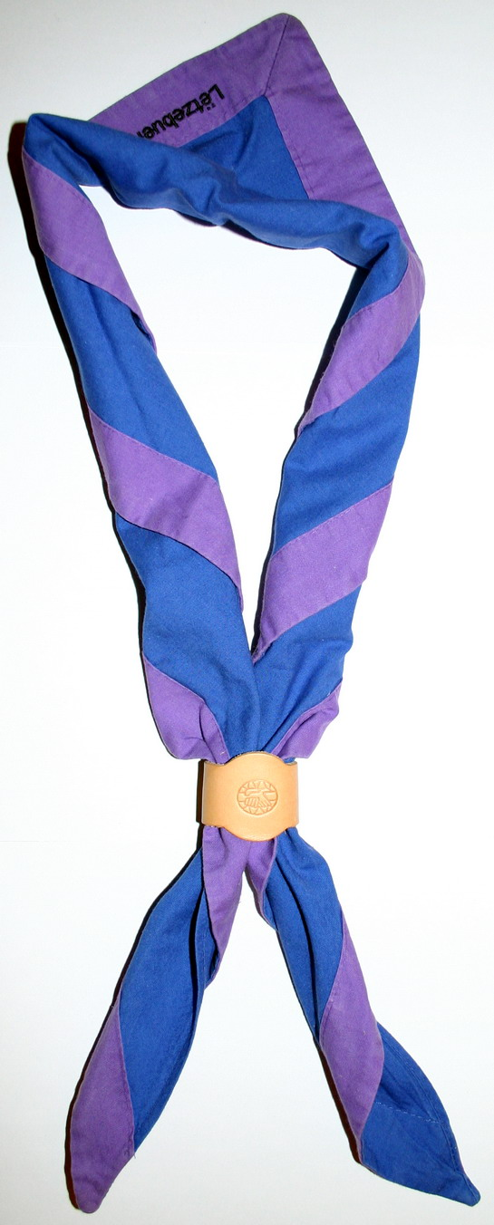 Avex Foulard mat Start